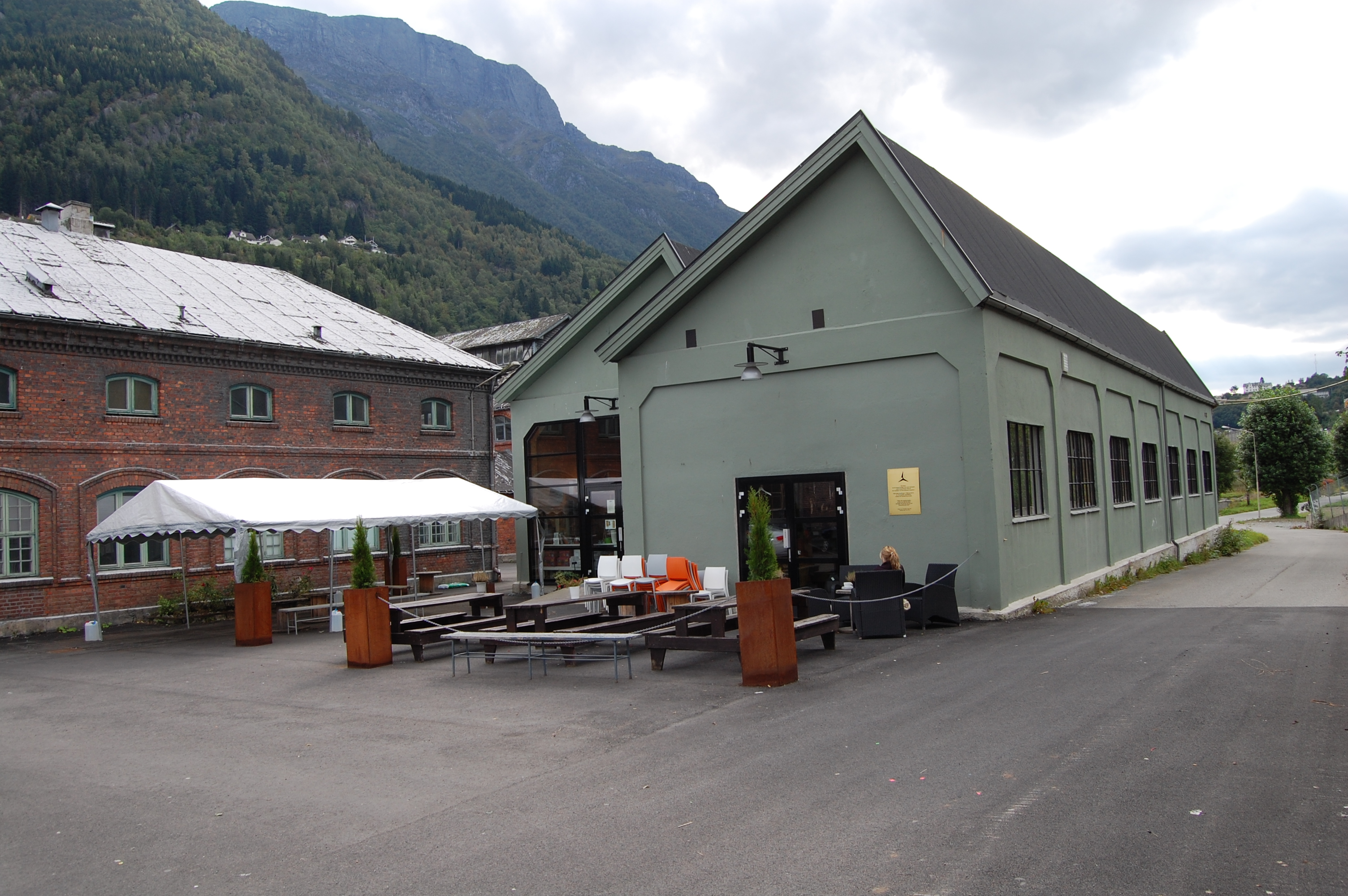 Plateverksted og smie for Cyanamiden (1918). Containerverkstedet ble også brukt til reparasjon av karbidcontainere og produksjon av elektrodemantler til smelteovner. I dag er bygget transformert og bl.a. benyttet til bevertning (Smelt Café).